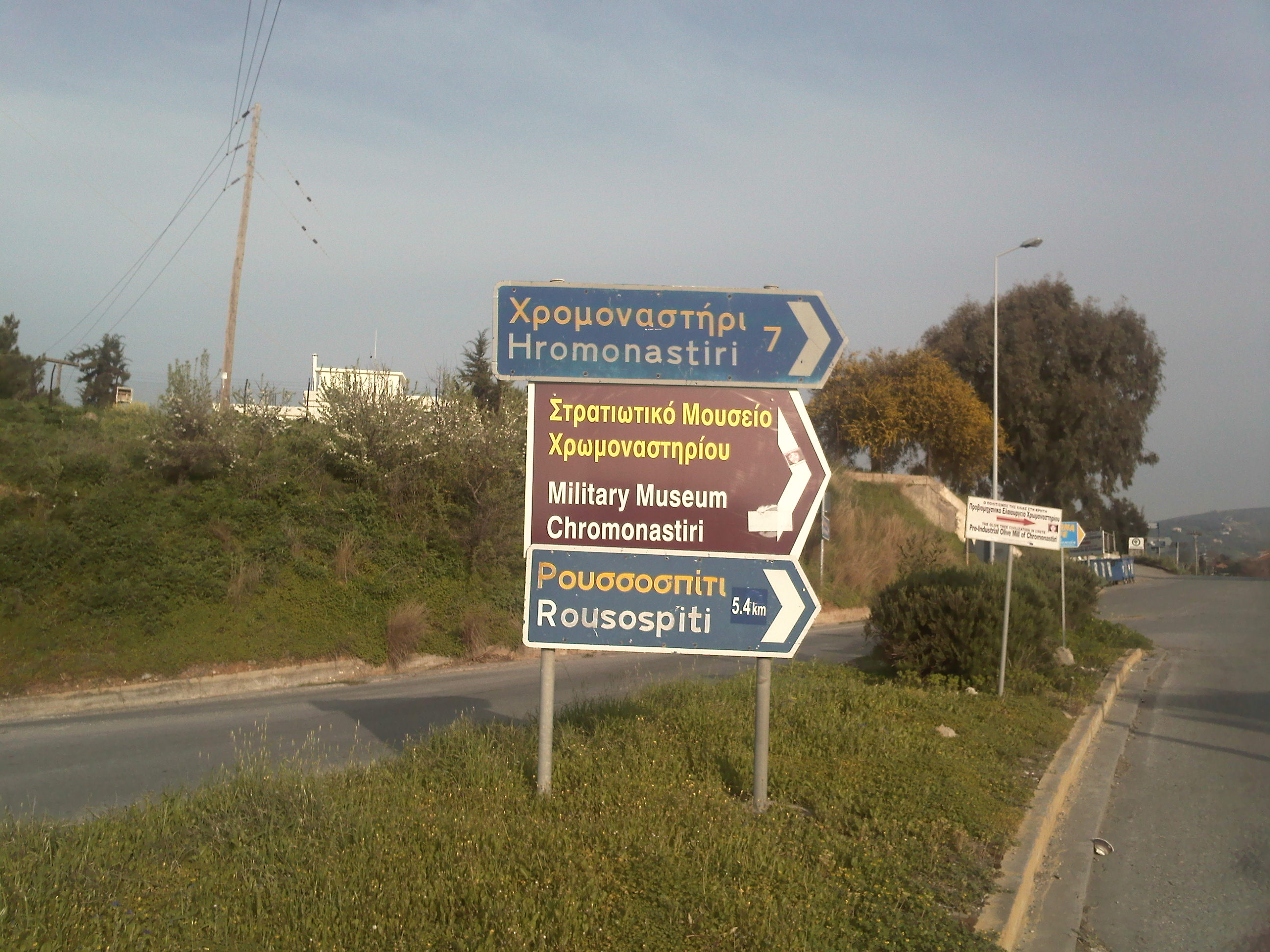 οι δύο ορθογραφίες του χρωμοναστήρι/χρομοναστήρι